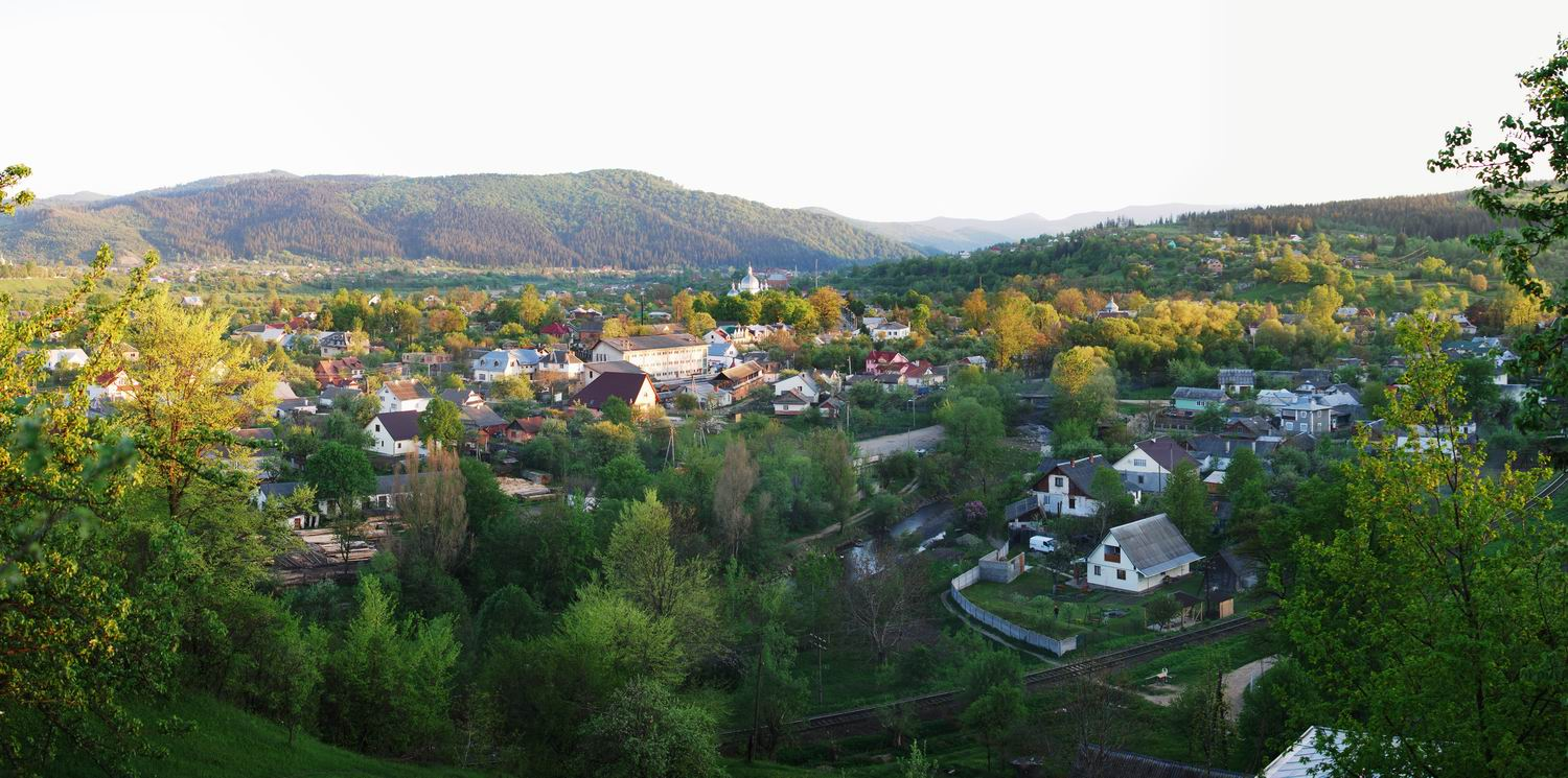 Делятин